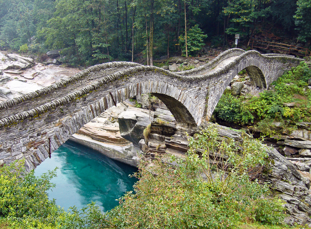 Ponte dei Salti ist die Brücke welche bei Lavertezzo über den Fluss Verzasca führt. In der Hauptsaison ist es beinahe unmöglich die Brücke ohne Menschen zu fotografieren.